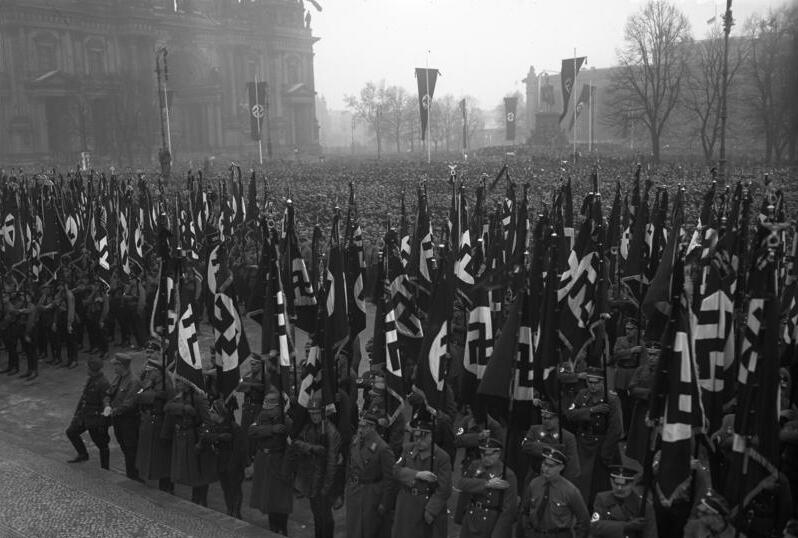 Amtswalter Vereidigung im Lustgarten in Berlin am 25. Februar 1934.